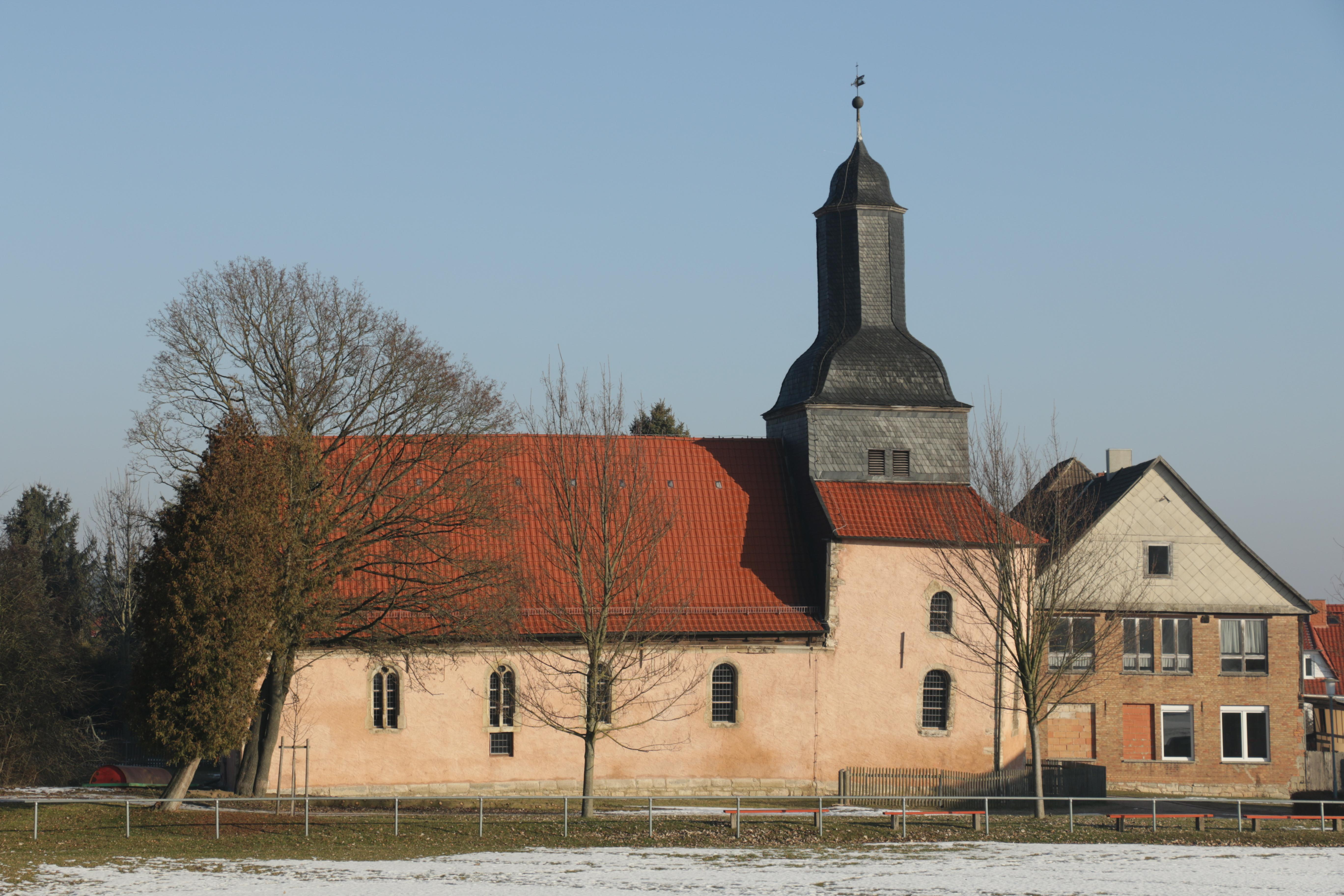 Haynrode, Sankt Anna-Kirche